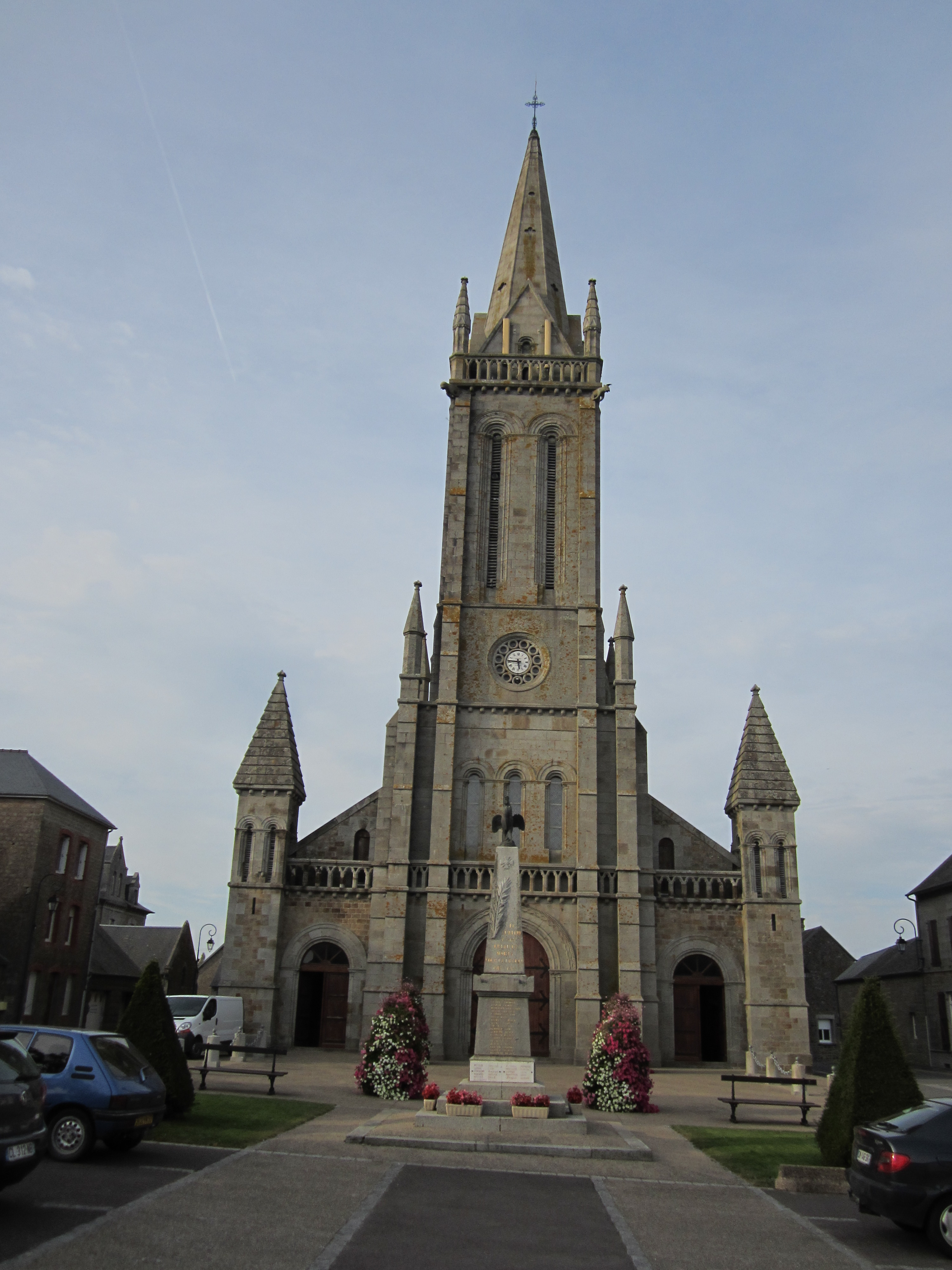 Le Teilleul, Manche .